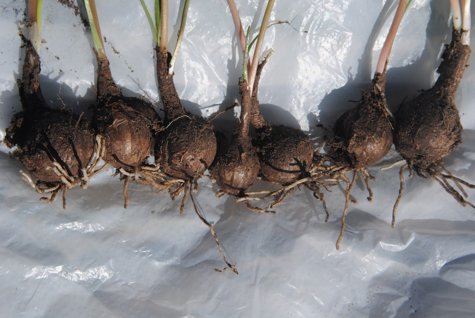 Habranthus tubispathus. Amaryllidaceae.Fotos tomadas al márgen de la Ruta 55 y en suelo rocoso al margen del Lago de Palmar, departamento de Soriano, Uruguay.